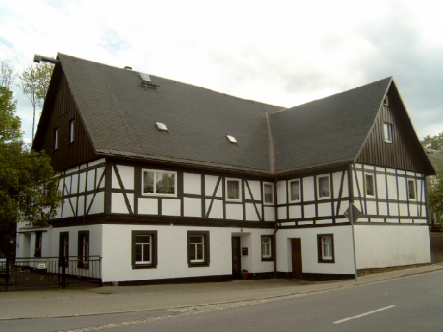 Ältestes Raschauer Fachwerkhaus, Annaberger Straße 30, Baujahr 1687 Sonstiges: ...